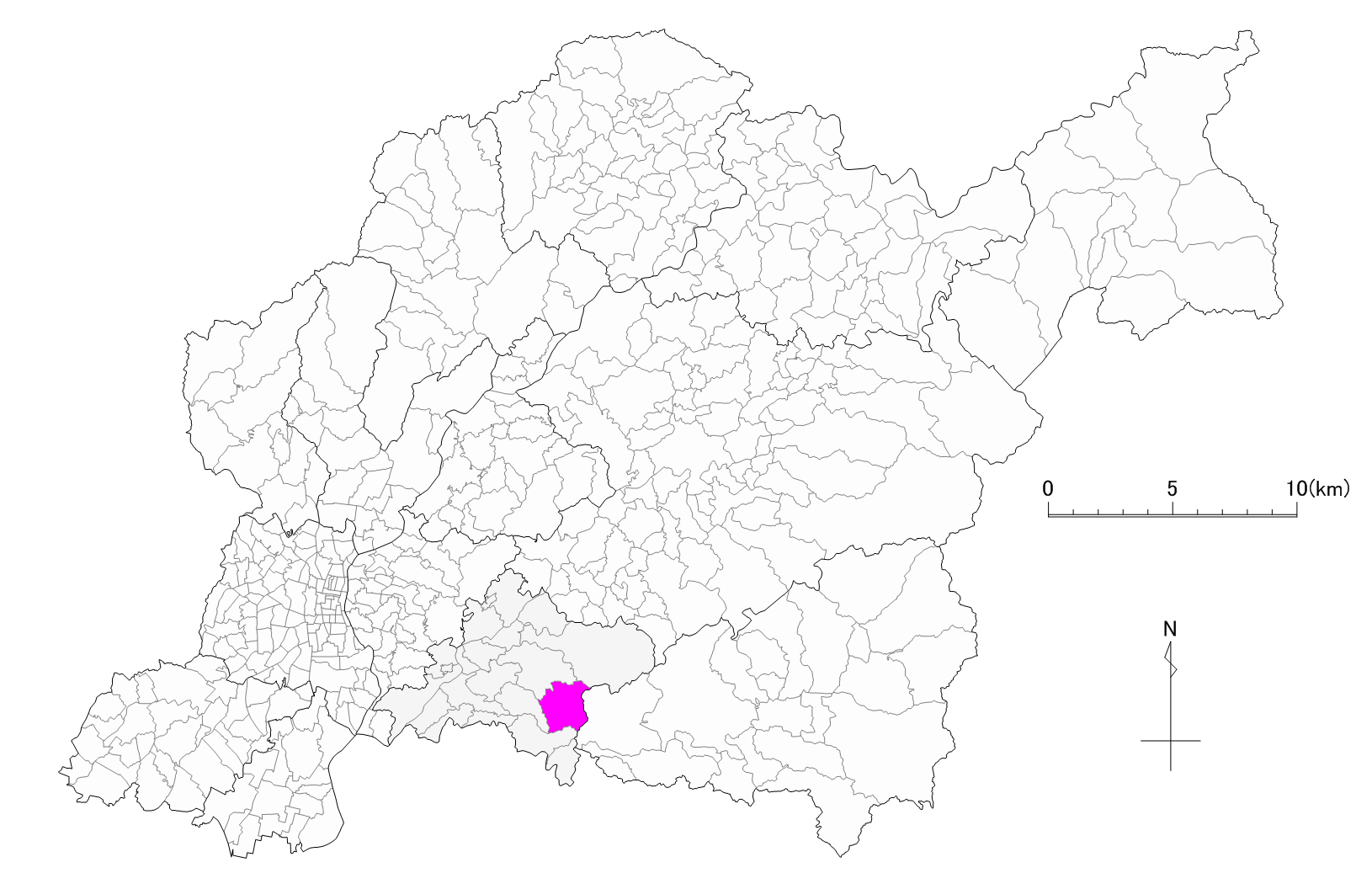 豊田市松平町位置図